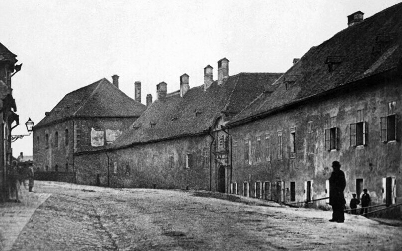 Nemocnice u sv. Anny, původně klášter dominikánek, budova vzadu je kostel sv. Anny, Pekařská ulice, Brno